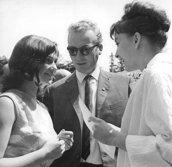 Karlsbad, Filmfestival, Blum, Beyer, Wertinskaja Zentralbild Hochneder 10.7.1964 14. Internationales Filmfestival in Karlovy Vary Die sowjetische Schauspielerin Anastasia Wertinskaja (r.)-Darstellerin der Ophelia in dem Film "Hamlet" unterhält sich mit DDR Schauspielerin Renate Blume und Regisseur Frank Beyer. Abgebildete Personen: Beyer, Frank: Regisseur, DDR (GND 119217899) Wertinskaja, Anastasia: Schauspielerin, Sowjetunion (en, ru) Blume, Renate: Schauspielerin, DDR (GND 138791945)